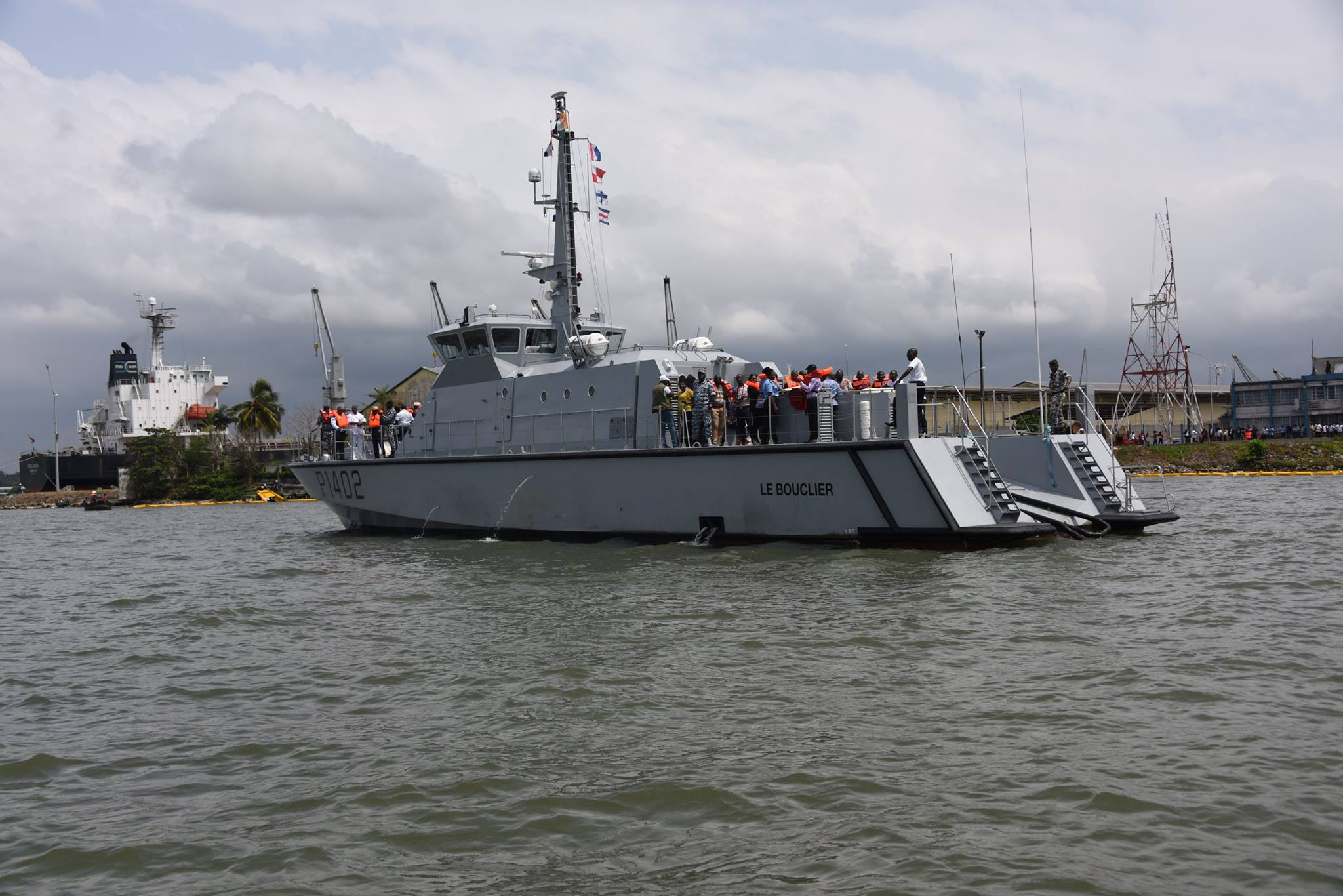 Patrouilleur le Bouclier de la marine ivoirienne